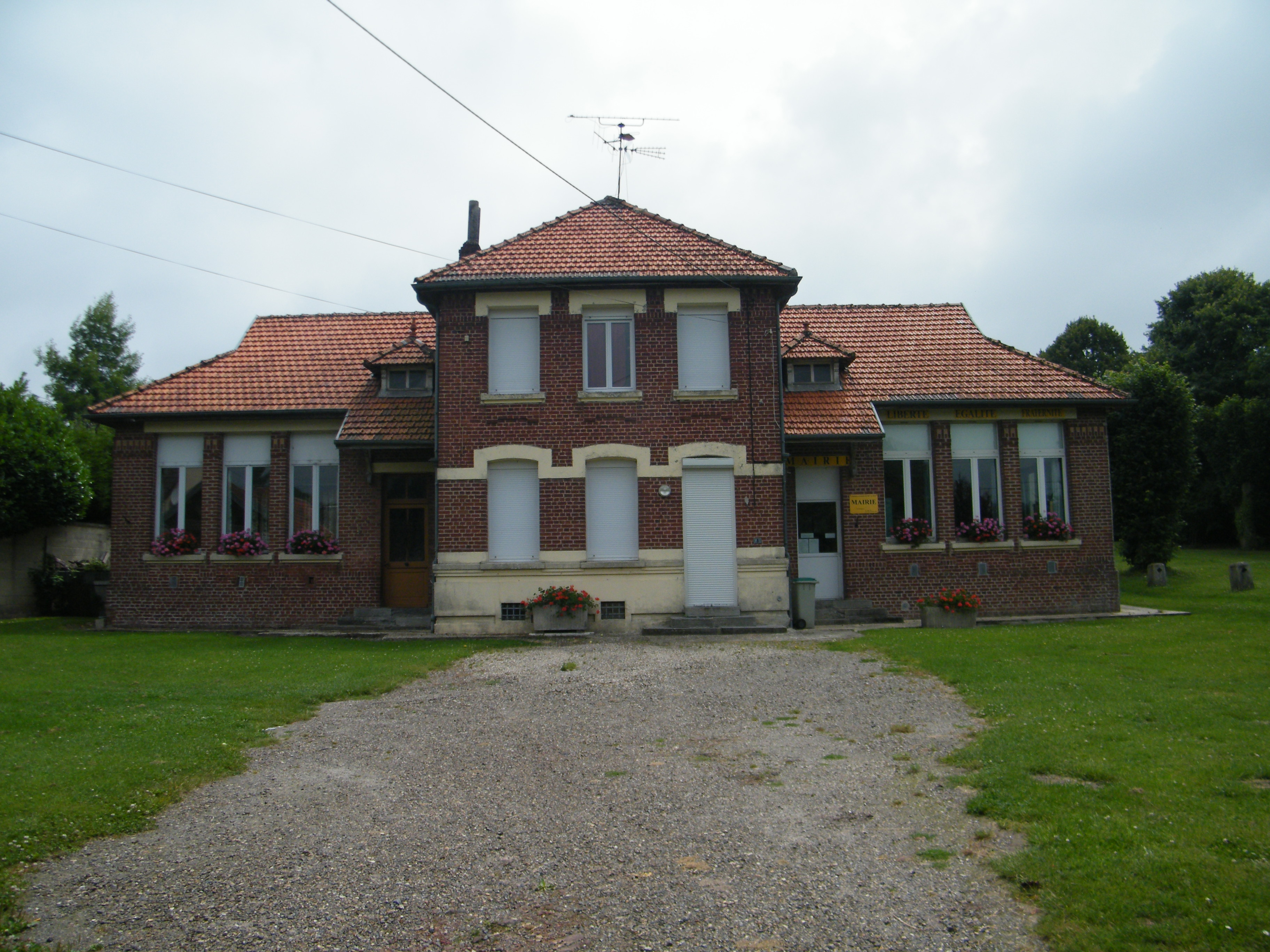 Mairie.